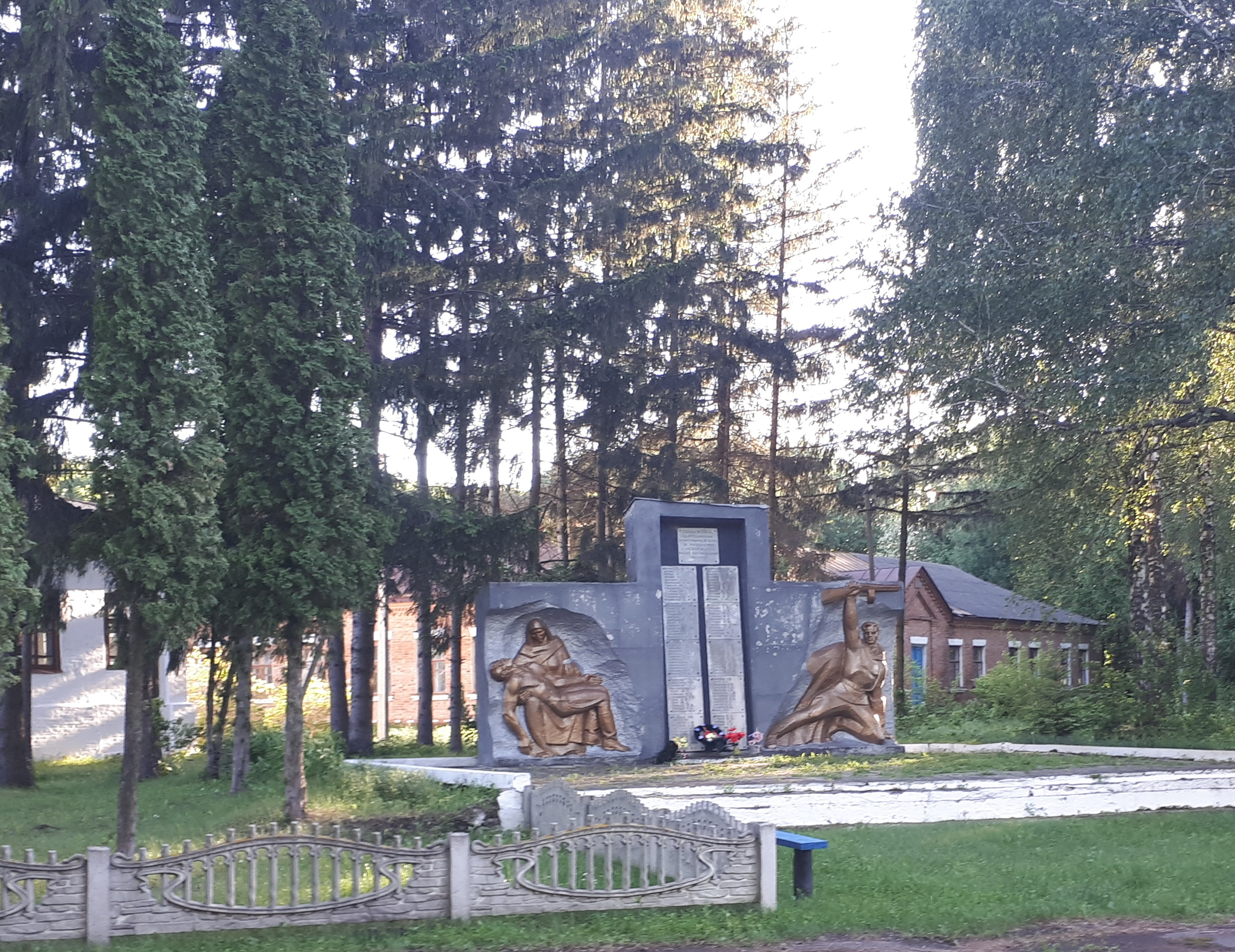 Пам’ятний знак 118 воїнам , які загинули в роки війни, С.Скороходове